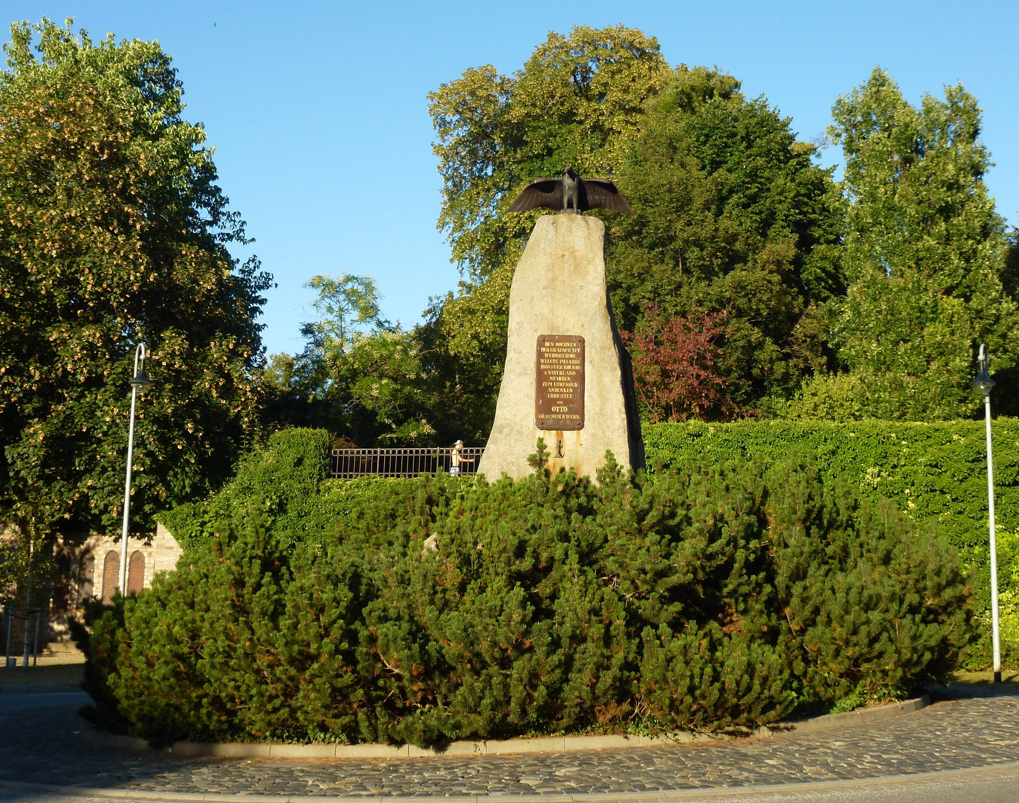 Denkmal in der Lindenallee in Wernigerode, 1868 vom Schloßbaumeister Carl Frühling auf Veranlassung von Otto Graf zu Stolberg-Wernigerode errichtet. Es erinnert an die Gefallenen der Kriege von 1864 (Deutsch-Dänischer Krieg) und 1866 (Deutsch-Österreichischer Krieg). Auf den Tafeln sind die Namen der Gefallenen verzeichnet. Der originale Adler war nach Beschädigung ab den 1970er Jahren verschwunden und wurde nach 1993 neu angefertigt und aufgesetzt.